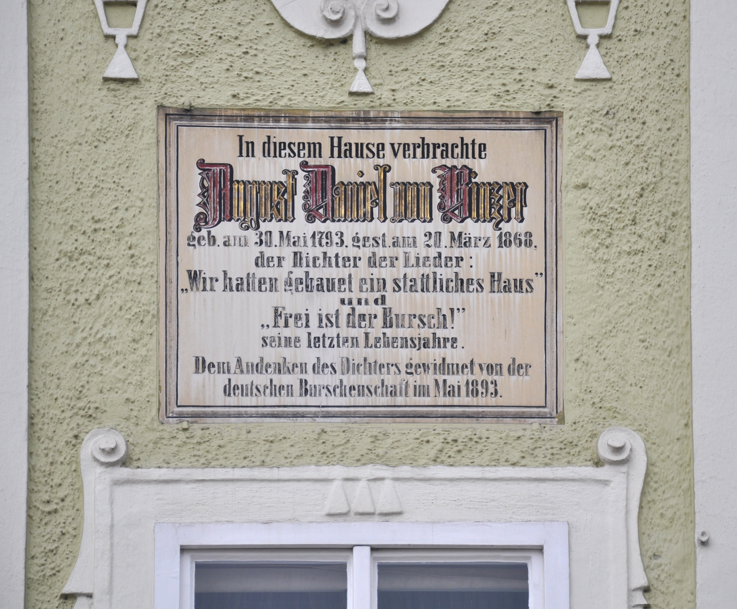 Linz, Danmillerhaus (Promenade), Gedenkinschrift für August Daniel von Binzer